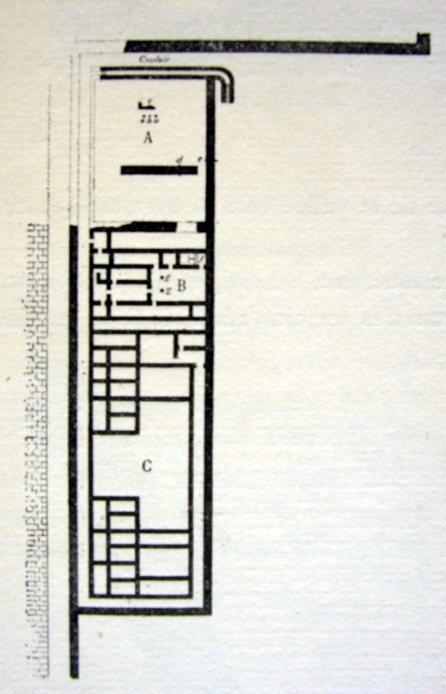 plan du temple funéraire d'amenemhat III à Dahchour